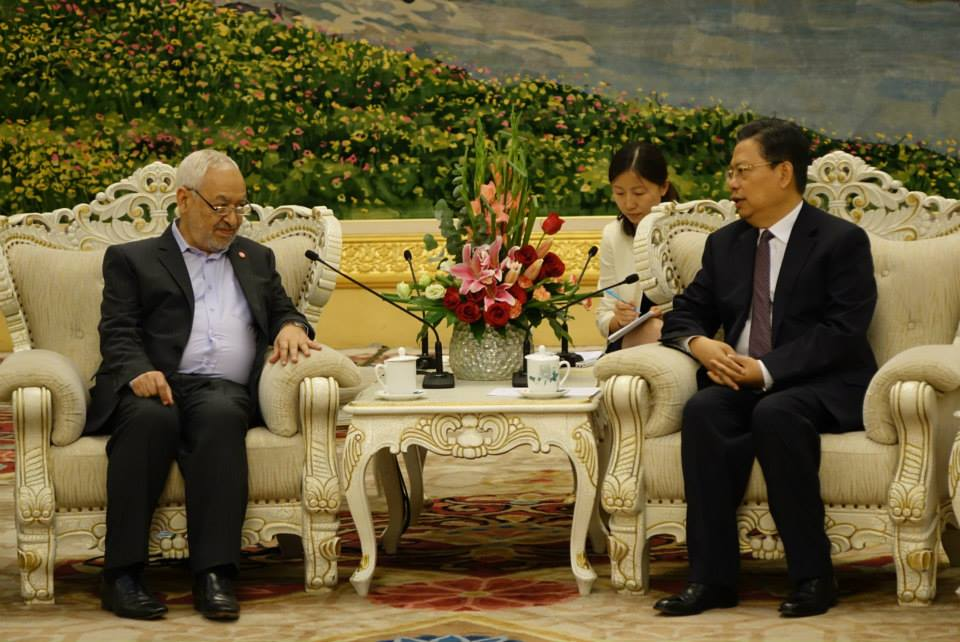 Photo de la visite officiel de la Mouvement Ennahdha en Chine. Ici Rached Ghanooushi avec le 11e président du Comité permanent de l’Assemblée populaire nationale chinois Zhang Dejiang.